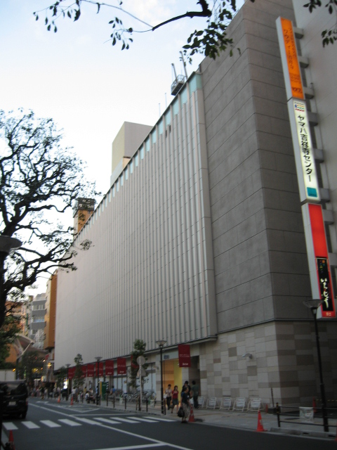 Isetan Kichijyoji